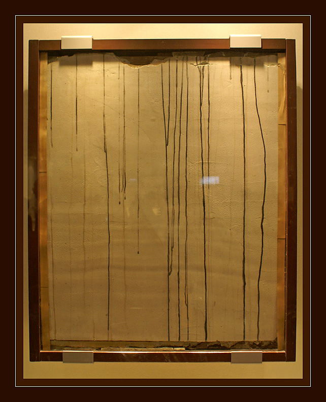 Muestra de una de las paredes de las casas de Japón afectadas por la lluvia negra, donde puede apreciarse las grietas que abrieron sobre la estructura.